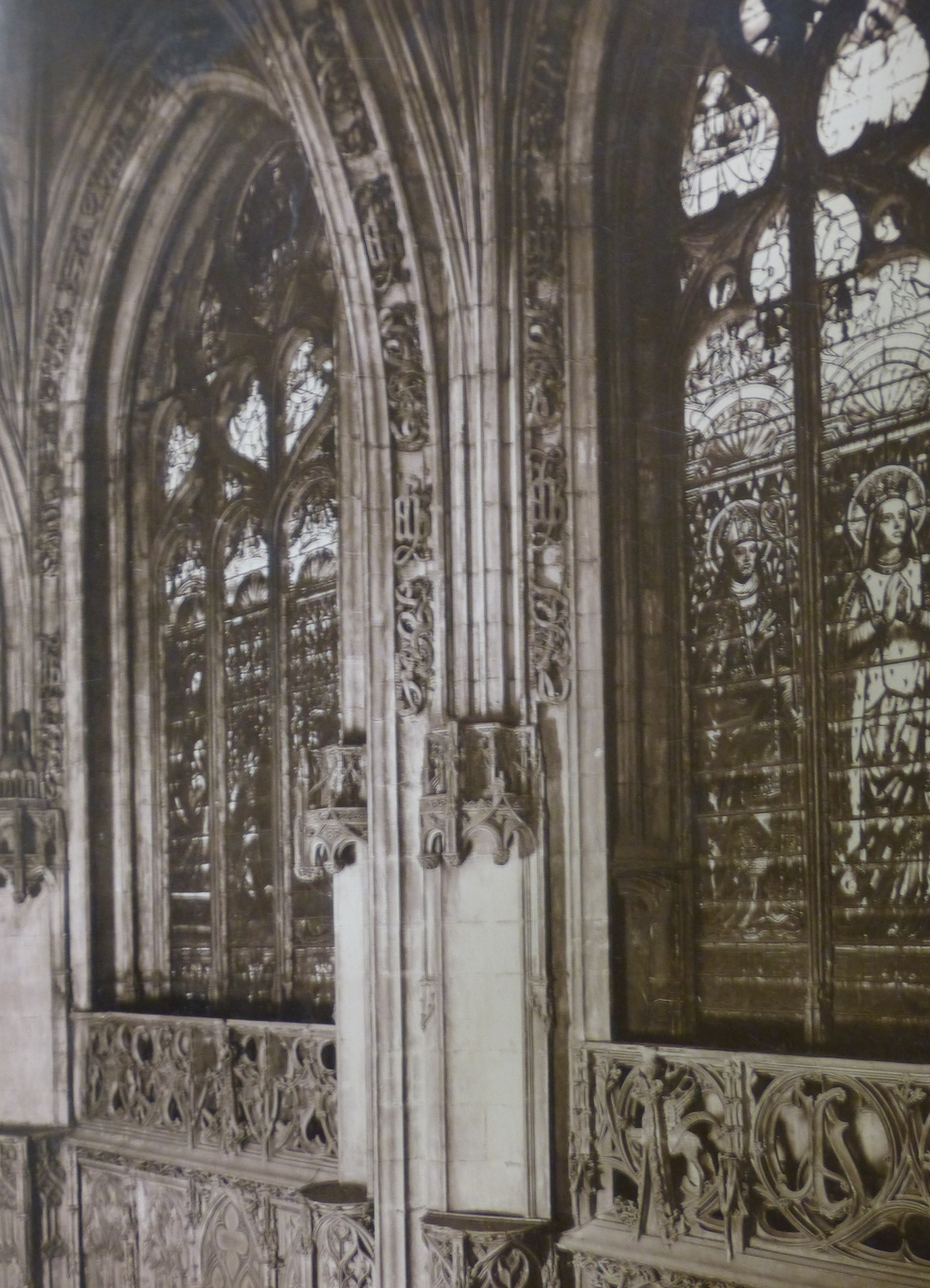 Photographie (fin {XIXe siècle) de la chapelle des Bourbons (Primatiale Saint-Jean de Lyon) Les vitraux visibles sur cette image ont été détruits durant la Seconde guerre mondiale.